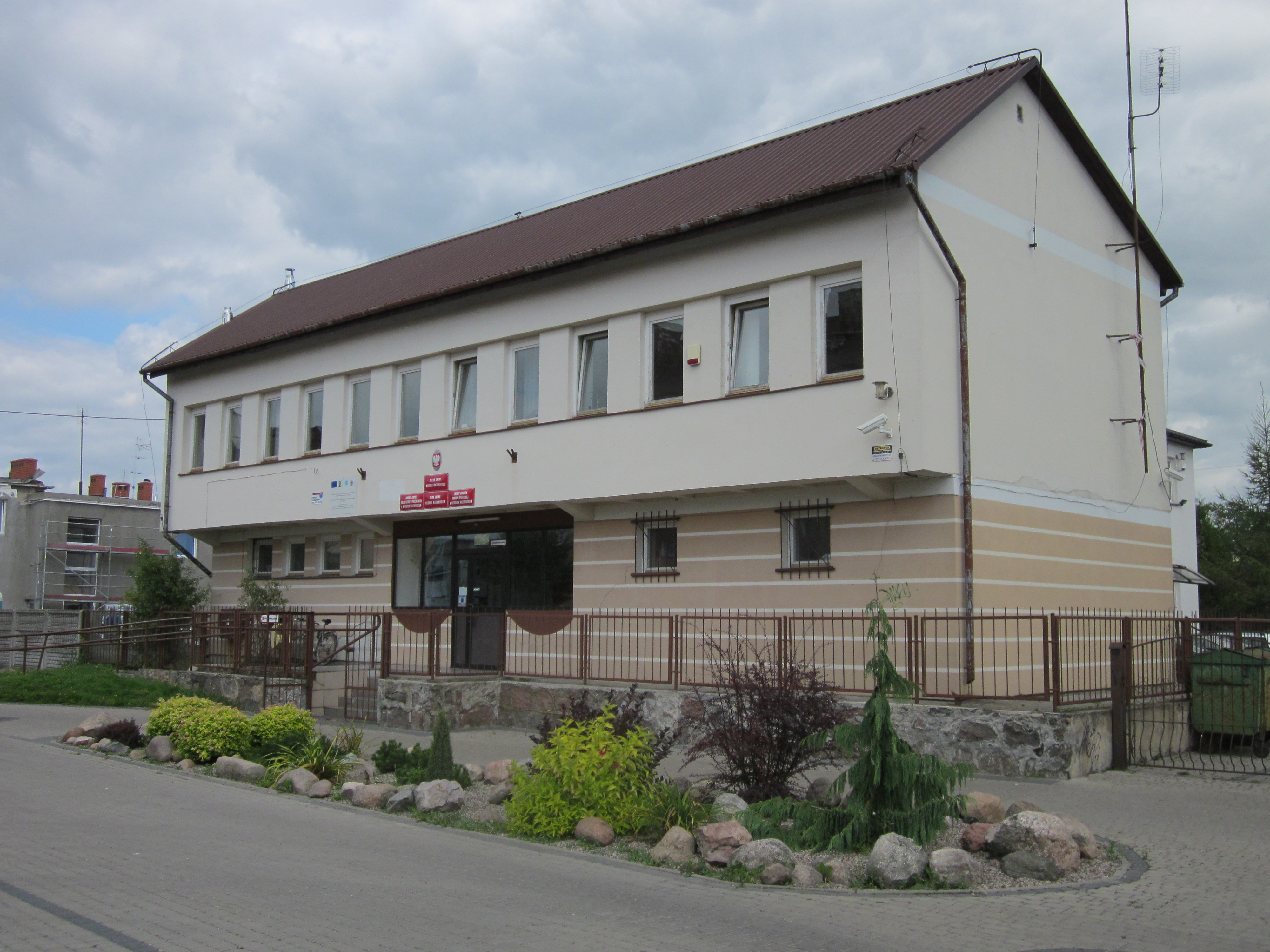 Budynek ten znajduje się przy ul. Mickiewicza 1 A. Jest to siedziba gminy wiejskiej.